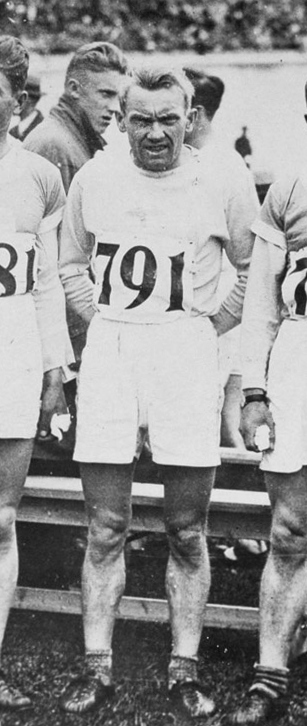 Olympische Spelen 1928 Amsterdam, Nederland. Atletiek. Finse marathonlopers. Verner Laaksonen.